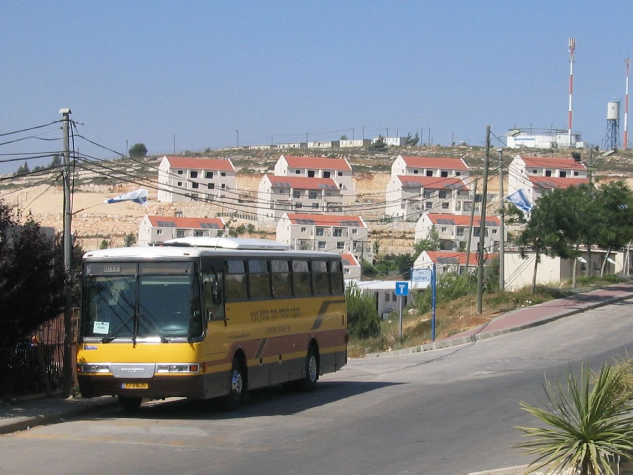 Beit El